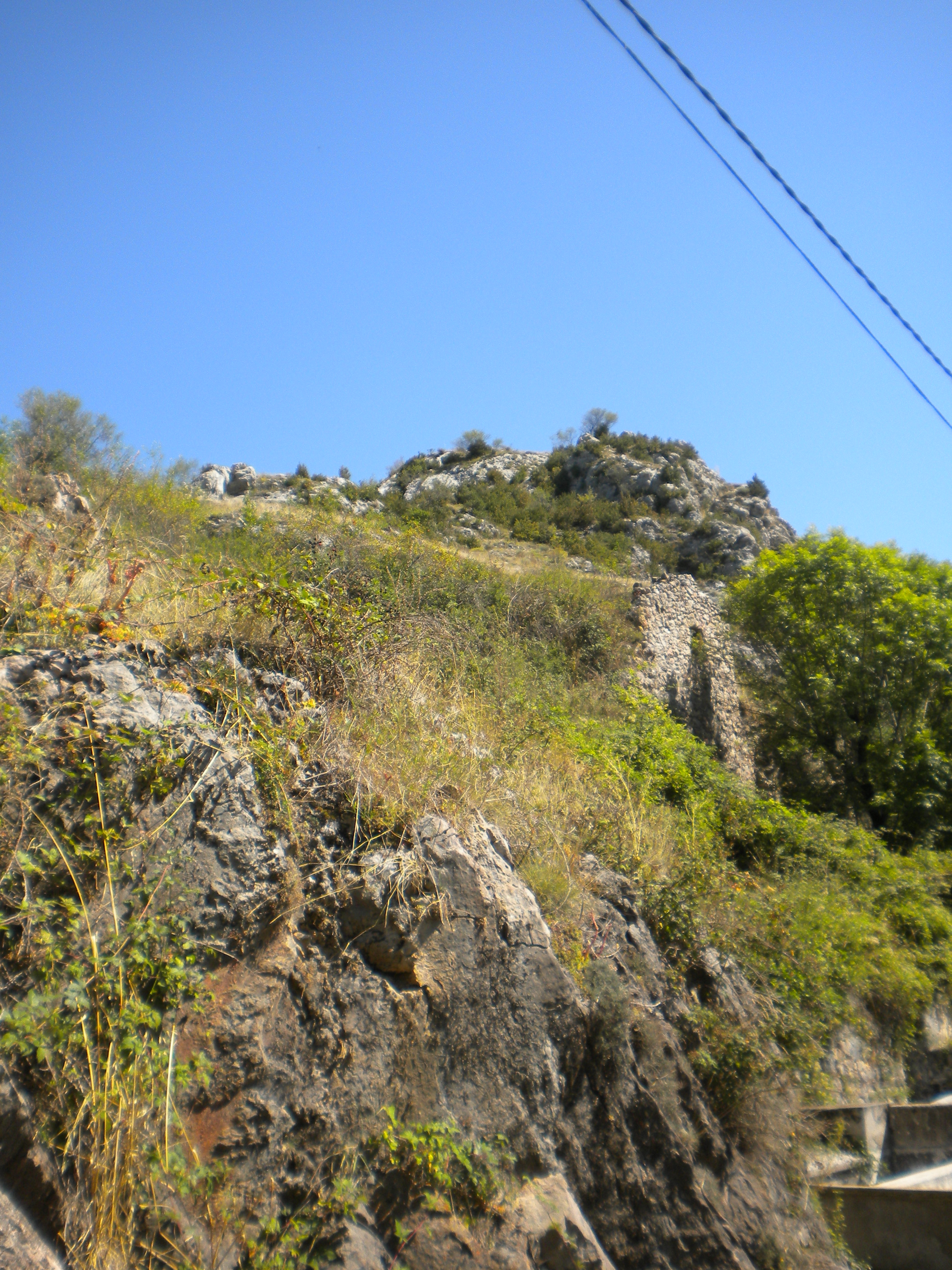 Ruines del castell medieval de Viu de Llevata, vistes des del poble de Viu.